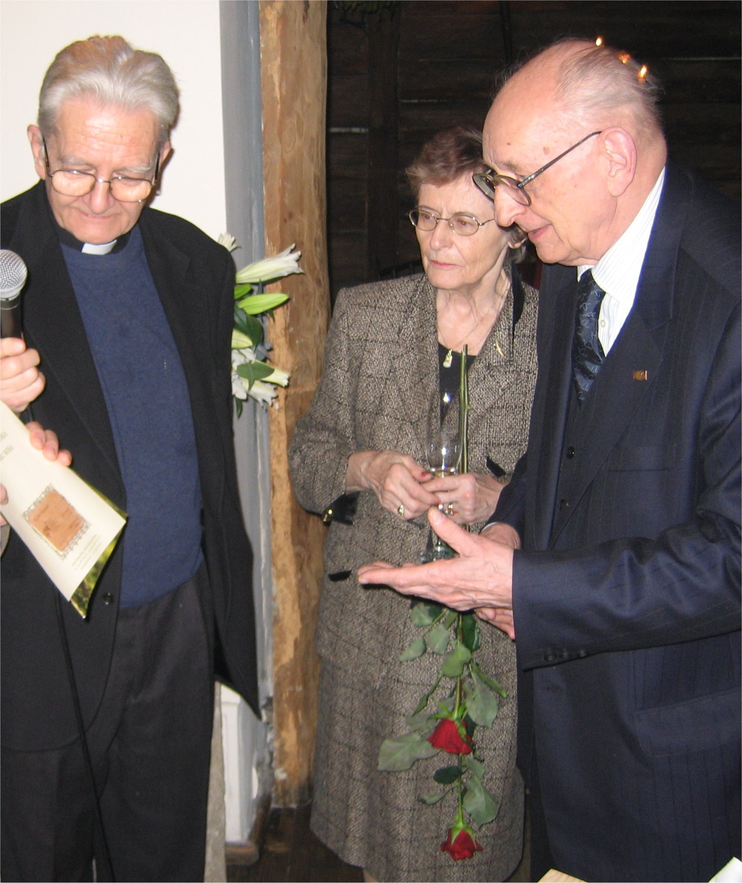 Adam Boniecki (b. 1934), Polish Catholic priest, editor-in-chief of "Tygodnik Powszechny", Zofia (b. 1927) and Władysław Bartoszewski (Warsaw, 19.02.1922, - Warsaw, 24.4.2015), Polish historian, publicist, writer and diplomat